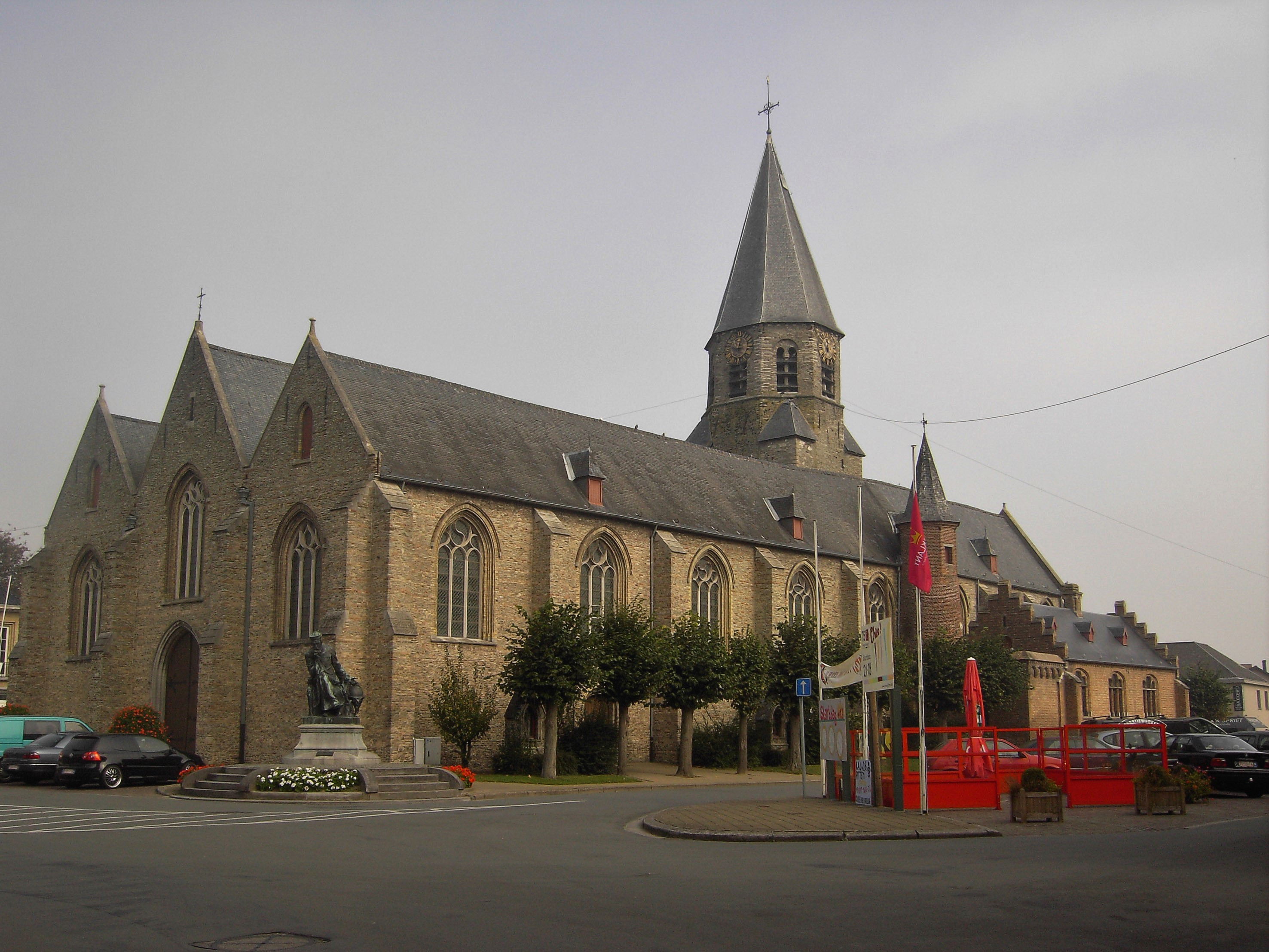 Pittem - Onze Lieve Vrouwkerk - West-Vlaanderen - België